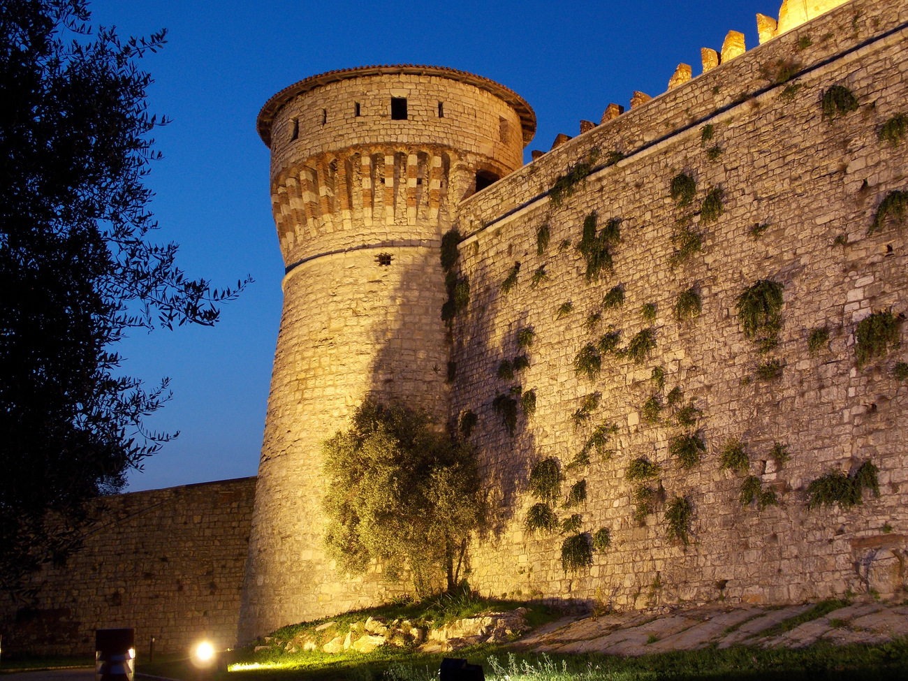 Castillo de Brescia. Torre de los Prisioneros